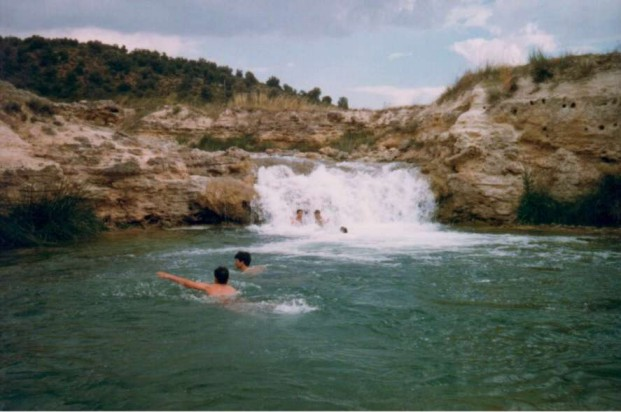 Fotografía realizada por Josemanuel